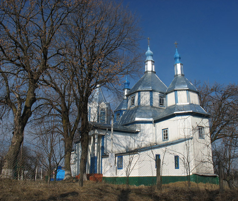 козацька дерев'яна Спасо-Преображенська церква в селі Кірове (1738 р.)